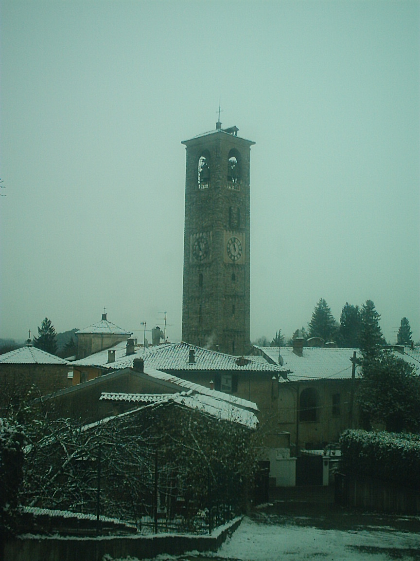 Campanile della Basilica di San Vittore ad Arcisate Autore: Claudia Migliari December 2005